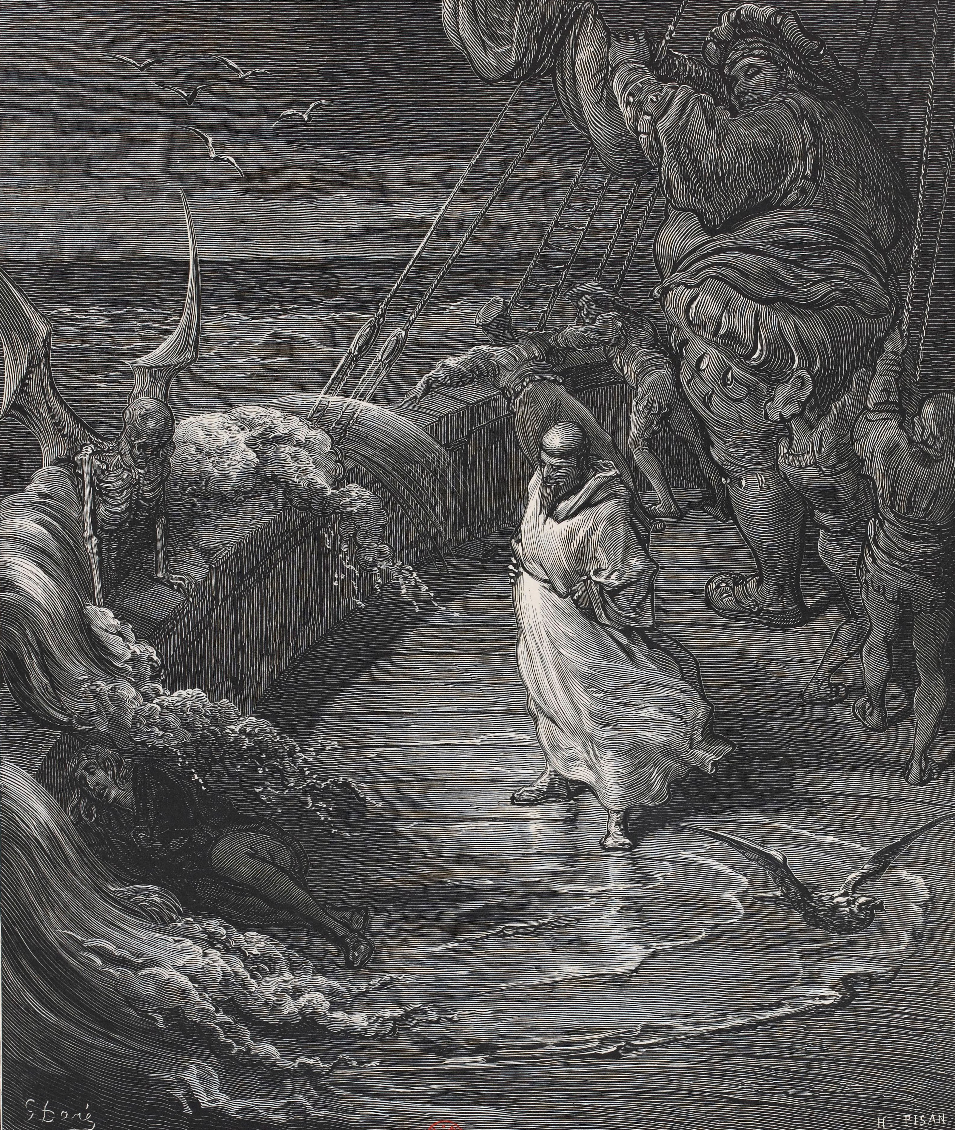 Illustrations du Quart Livre de Gustave Doré en 1873, éditions Garnier Frères